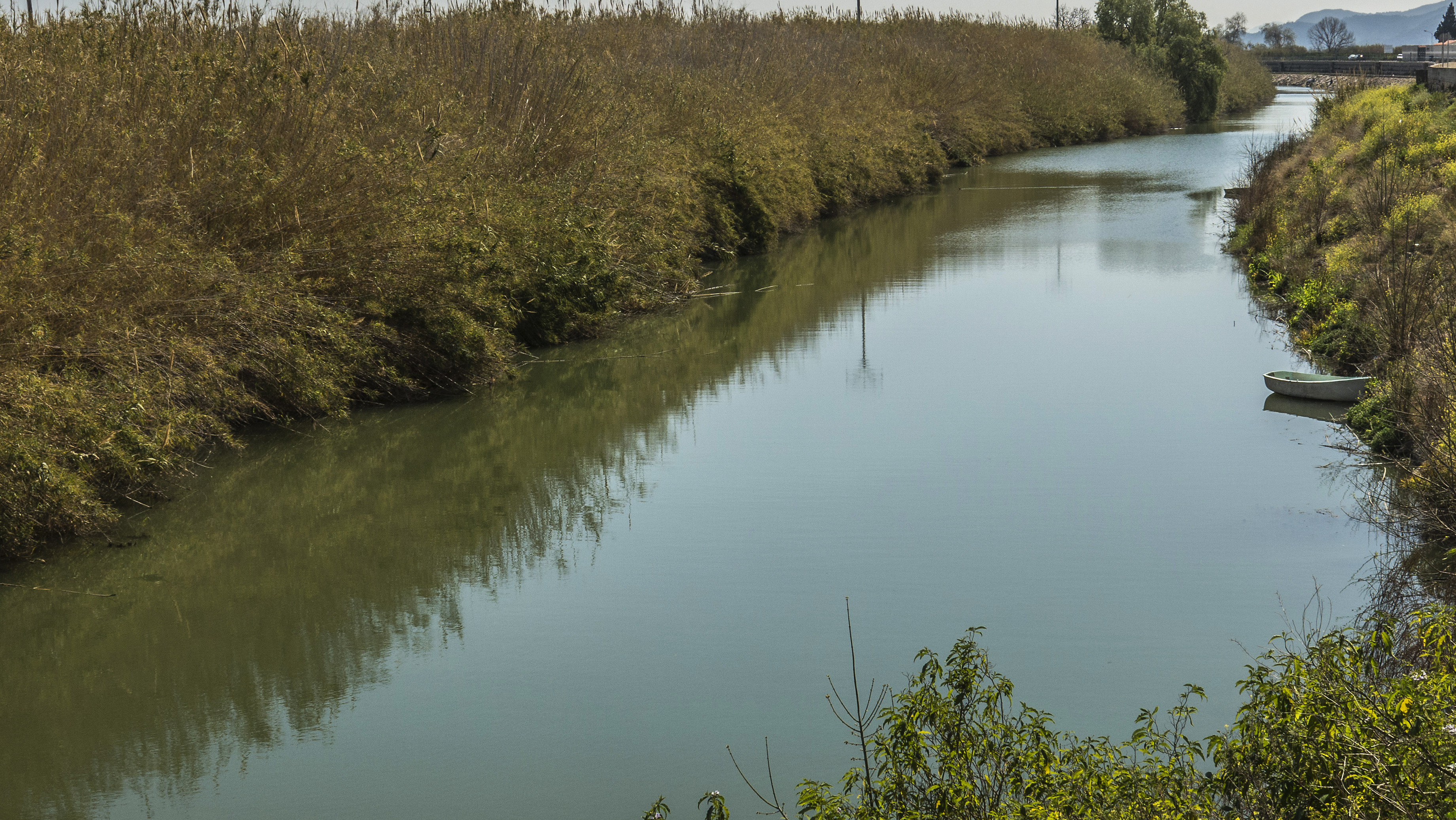 Fortaleny és un municipi de la Ribera Baixa, al País Valencià. Imatge editada en: Diari La Veu, La Confederació Hidrogràfica del Xúquer no adopta de moment cap mesura de desembassament excepcional, 12-09-2019